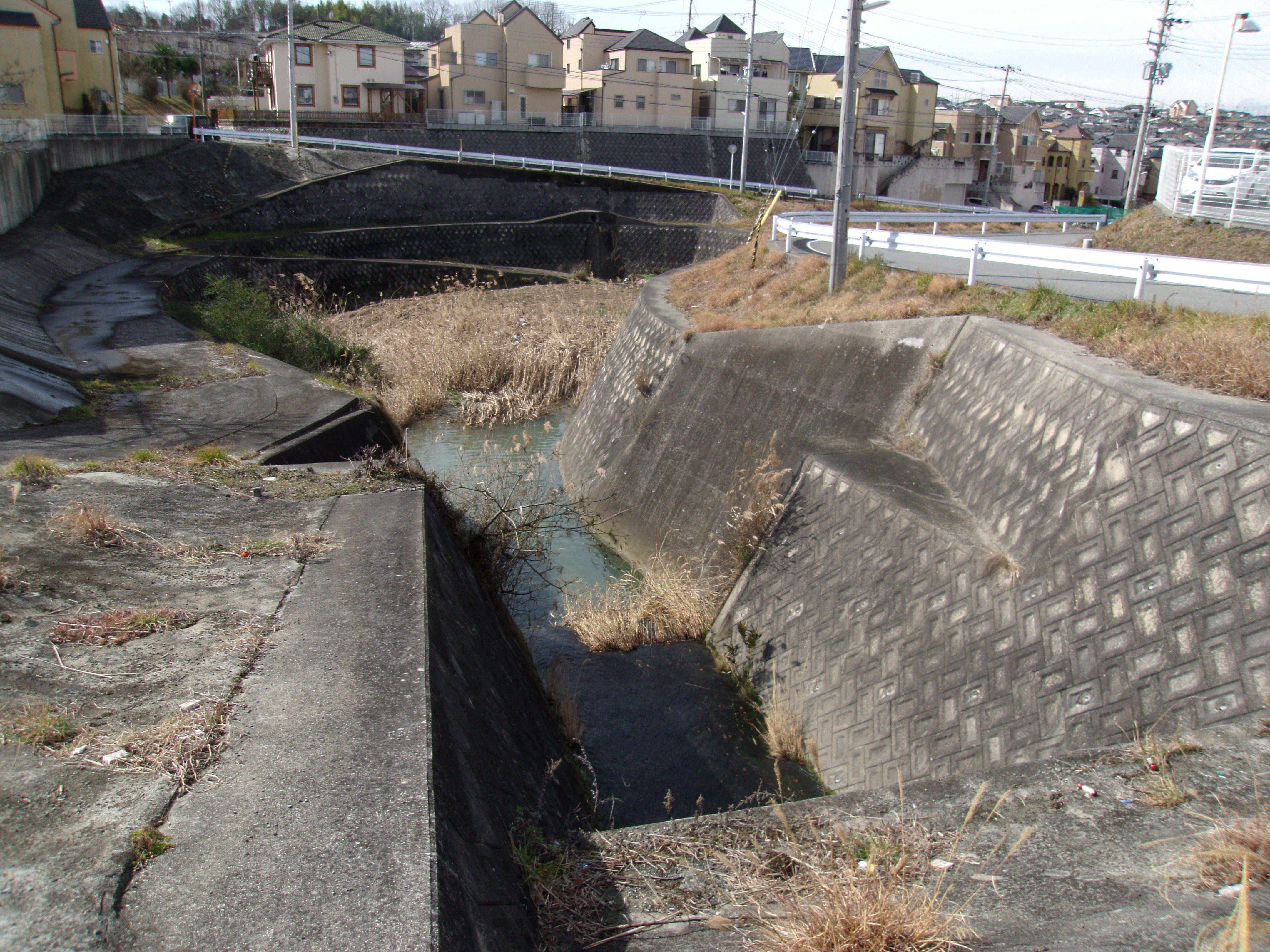 淡河疎水－三木市防災公園地中（芥子山隧道内）で分岐した支流が緑が丘町と志染町自由が丘を通過し、藪下川として姿を現す